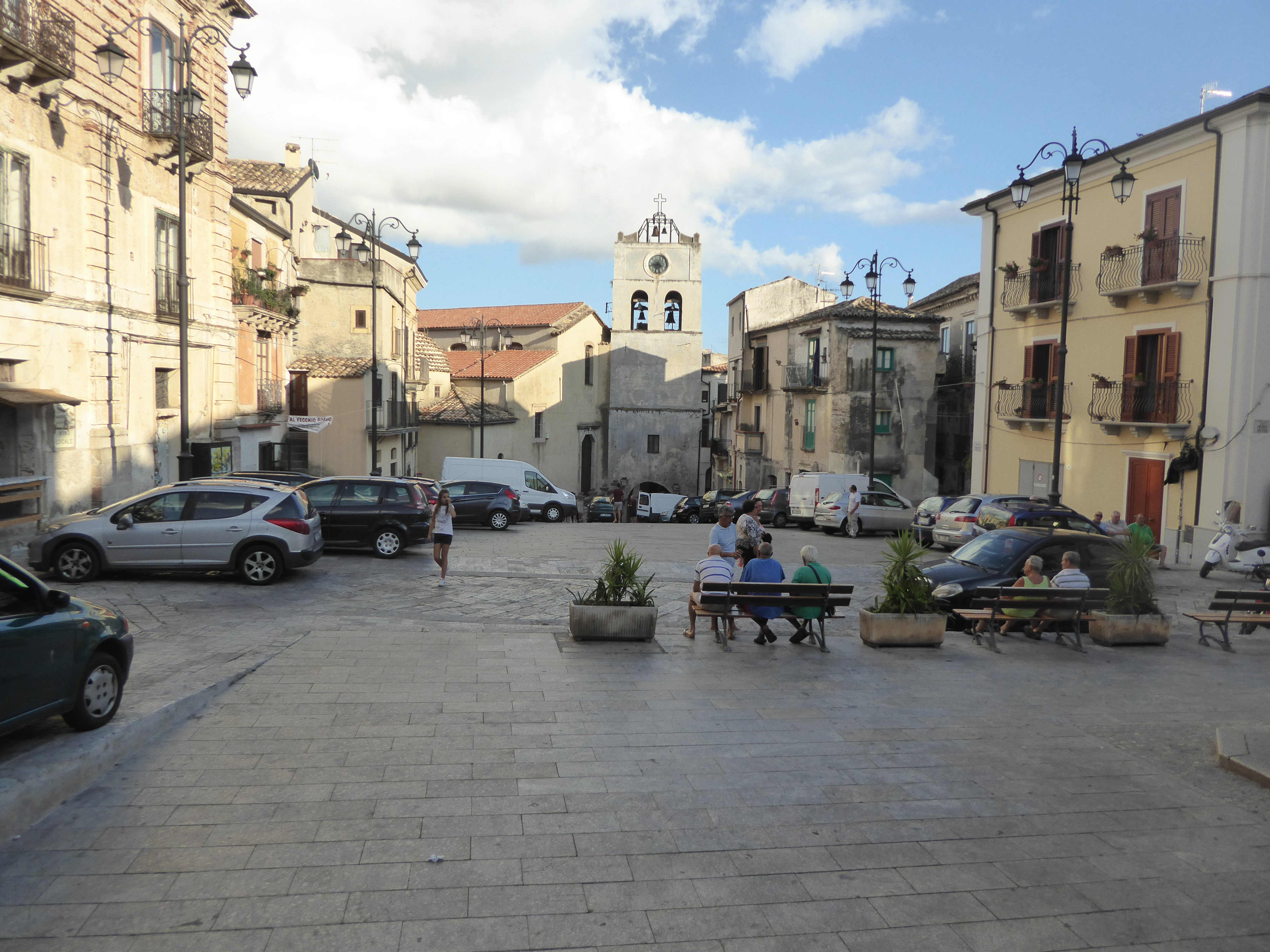 Piazza Mese di Caulonia (agosto 2018)